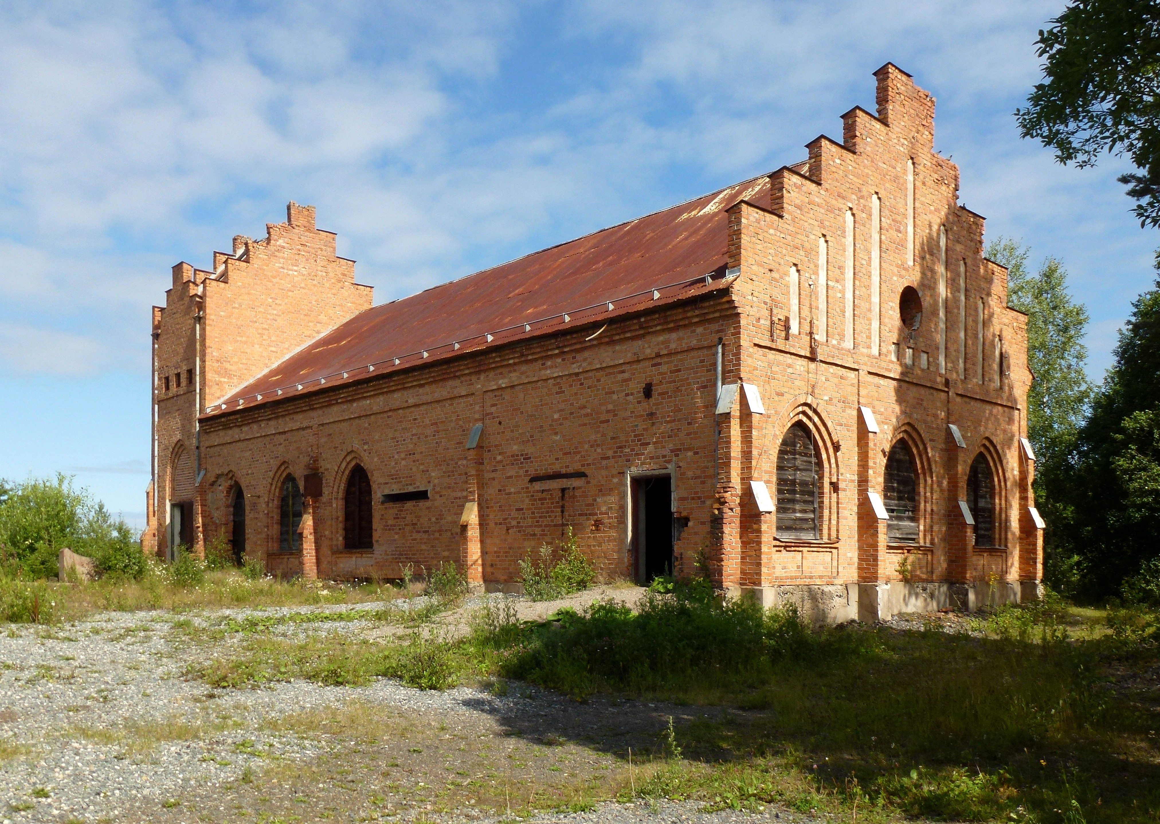 Tuna-Hästbergs gruva Spelhuset